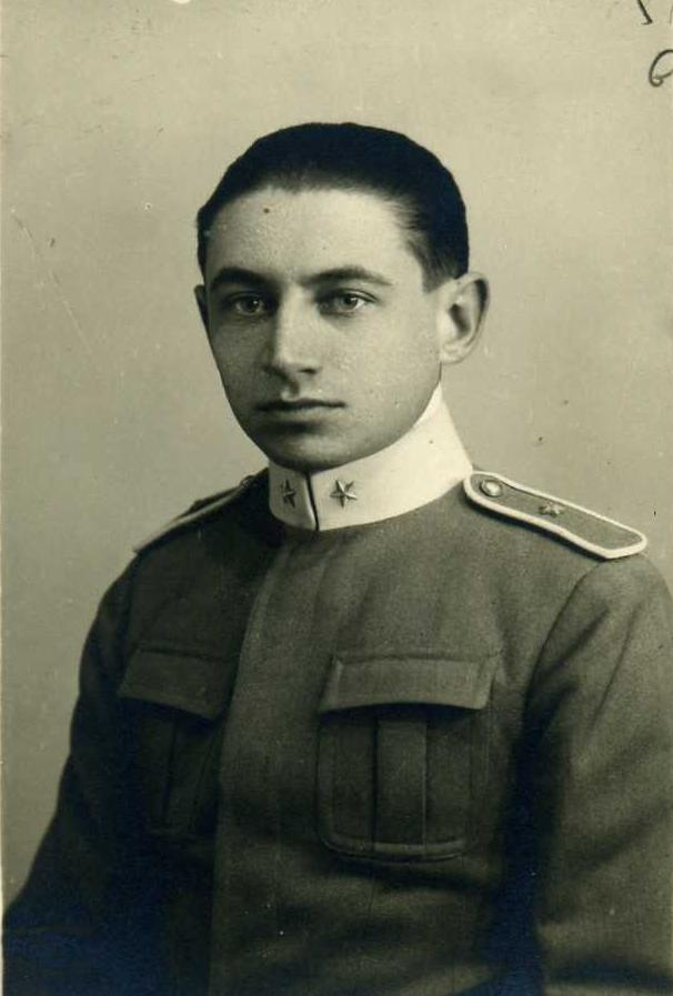 1920, Il Sottotenente Tullio Pinelli